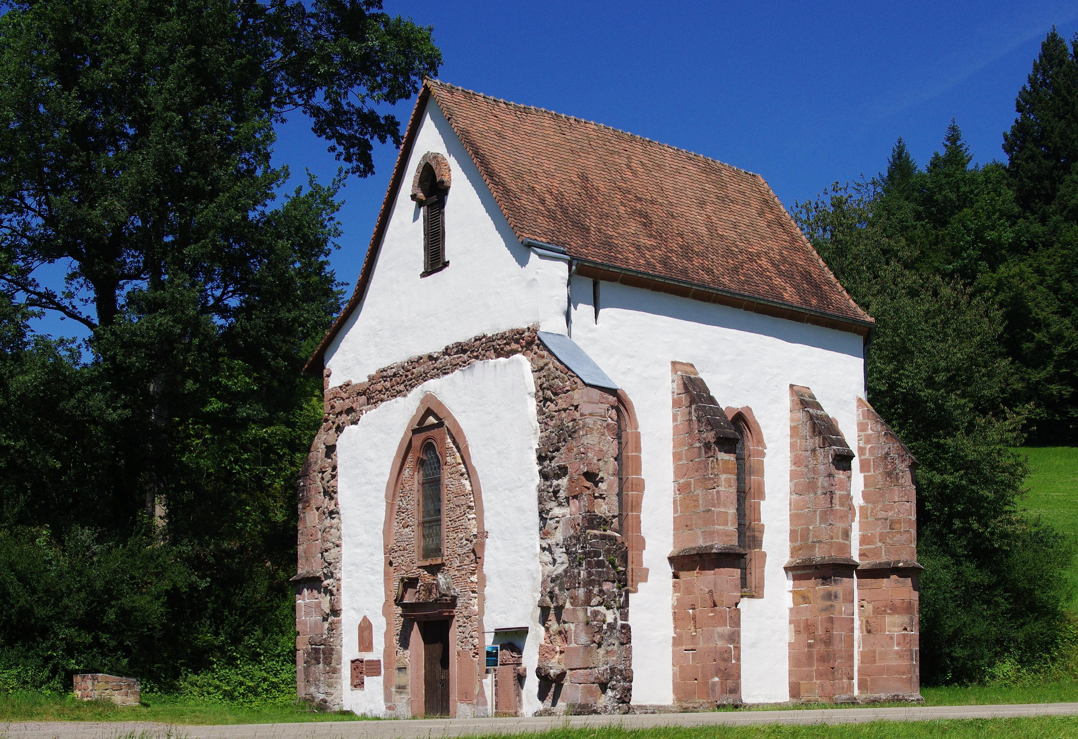 Kloster Tennenbach Kapelle die zum Krankentrakt gehörte